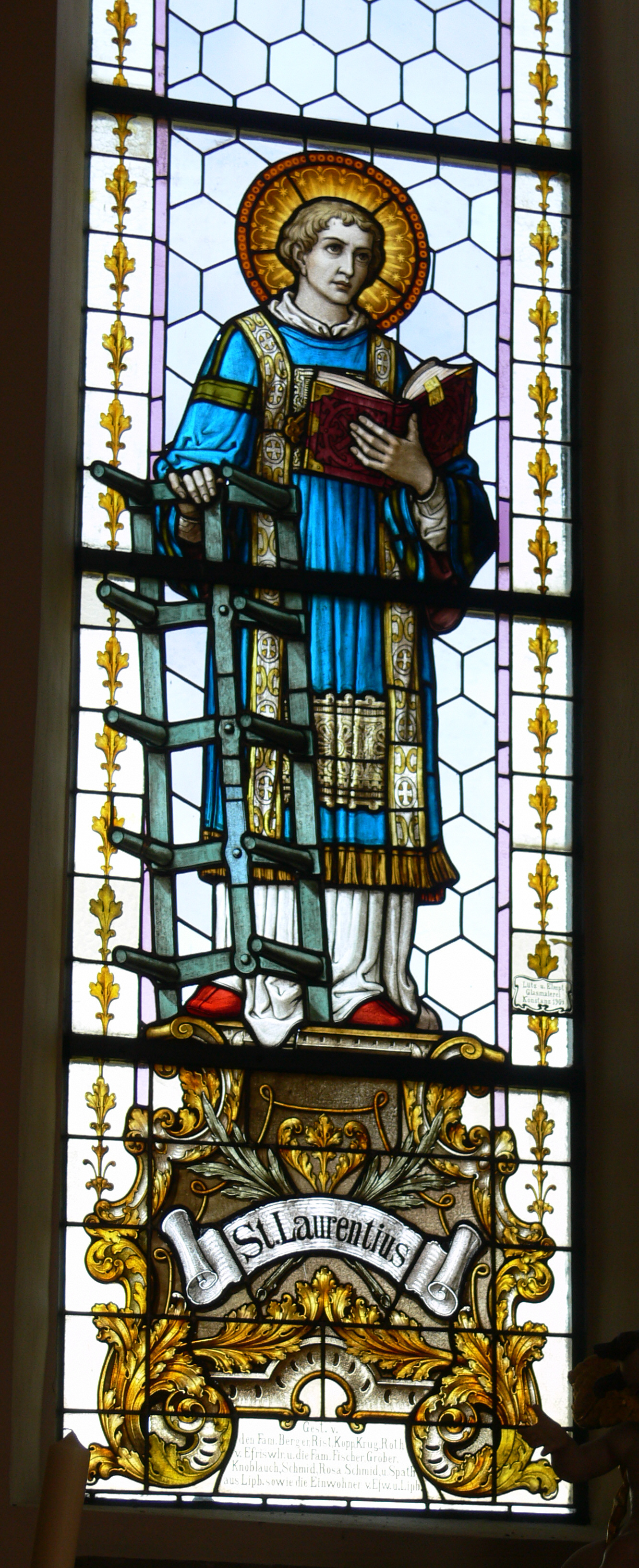 Pfarrkirche St. Gangolf, Kluftern (Stadt Friedrichshafen) Chorfenster "Hl.Laurentius", hergestellt 1904 von Lütz & Elmpt, Konstanz